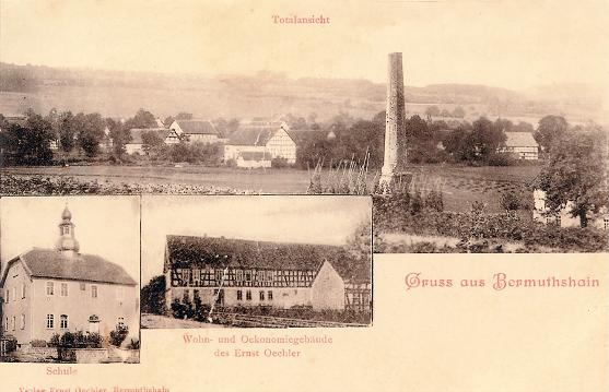 Um 1900 entstandene Postkarte von Bermuthshain.